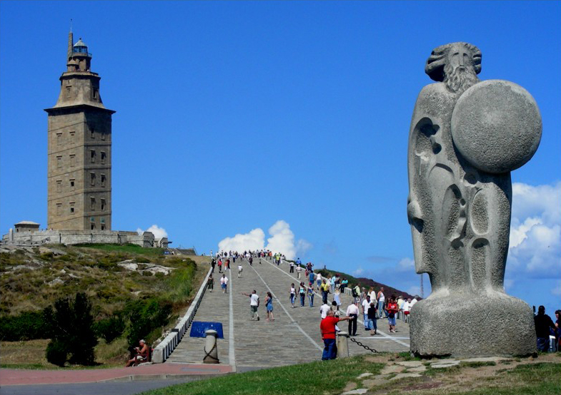 Parque escultorico da Torre de Hércules, A Coruña